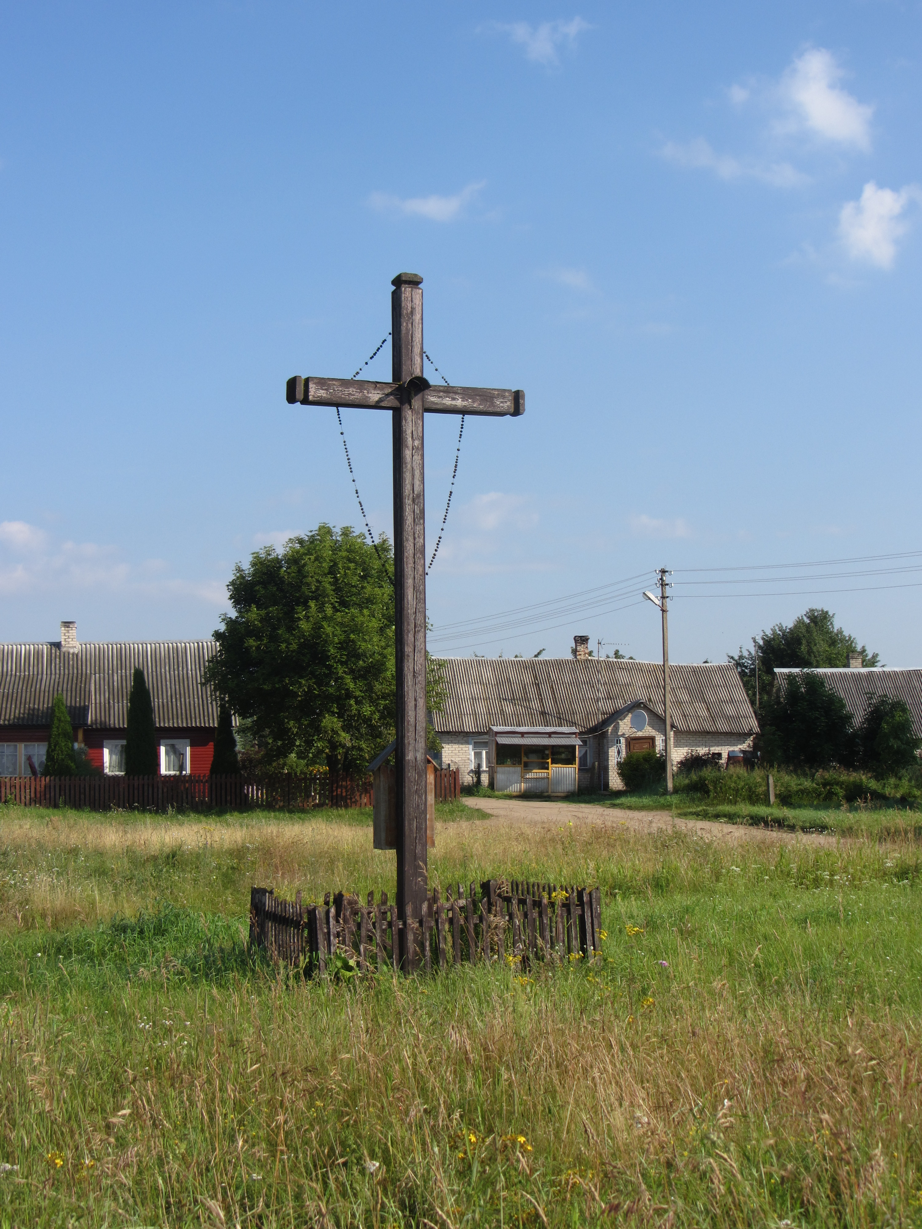 Madžiūnai, Lithuania